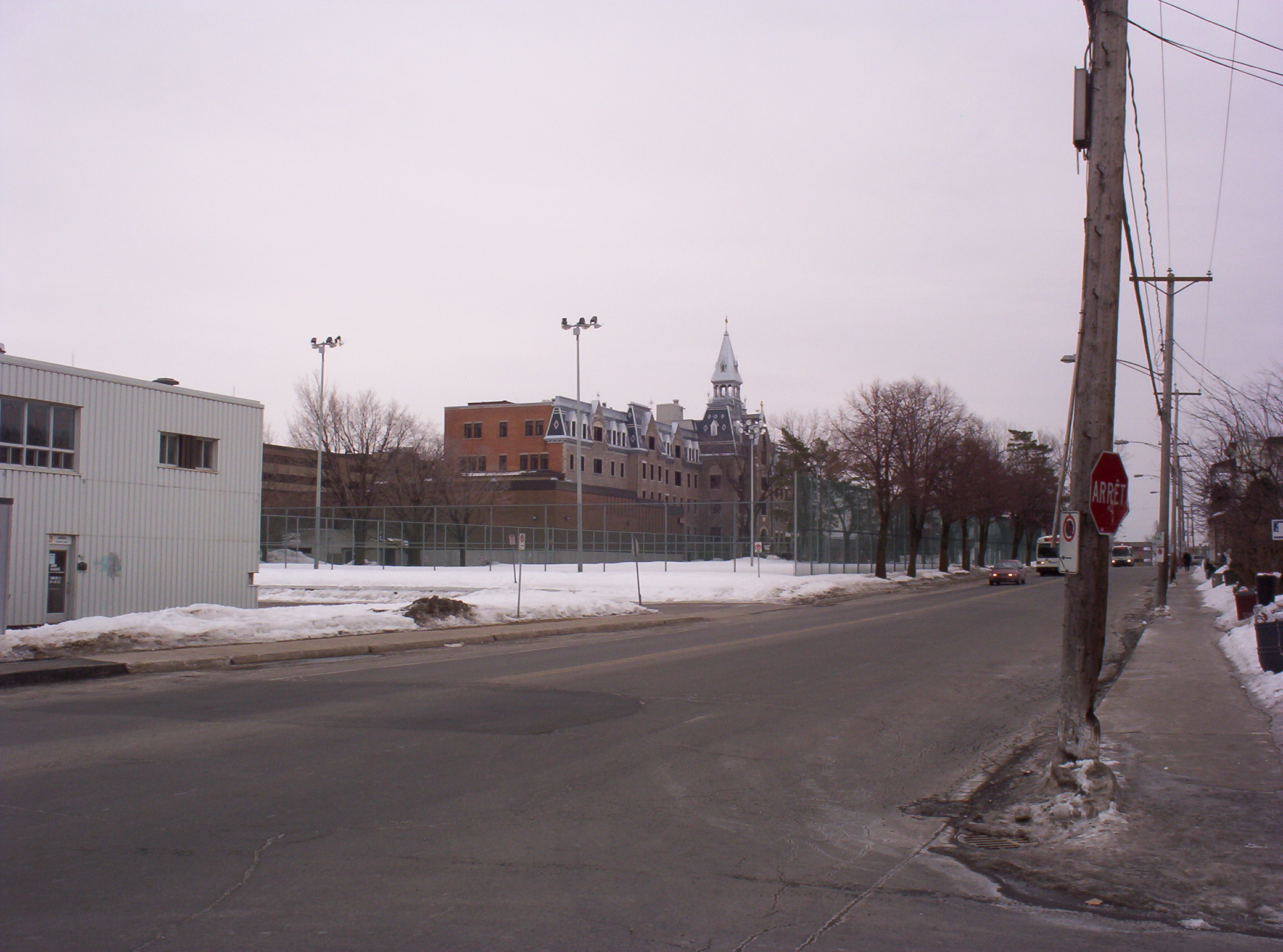 Collège Lionel-Groulx, vue de la rue Saint-Louis, in Sainte-Thérèse (Québec)